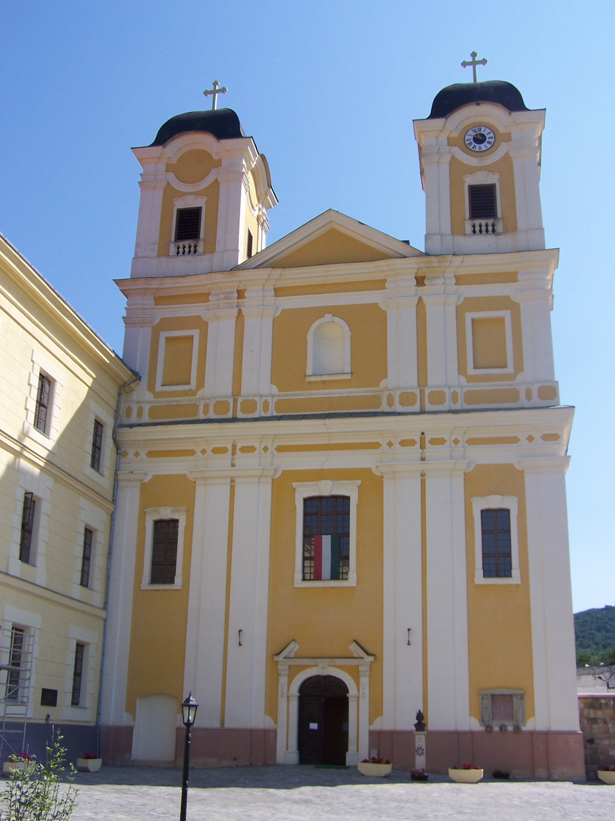 Római katolikus templom, volt pálos templom (Márianosztra, Rákóczi tér) This is a photo of a monument in Hungary. Identifier: 7122